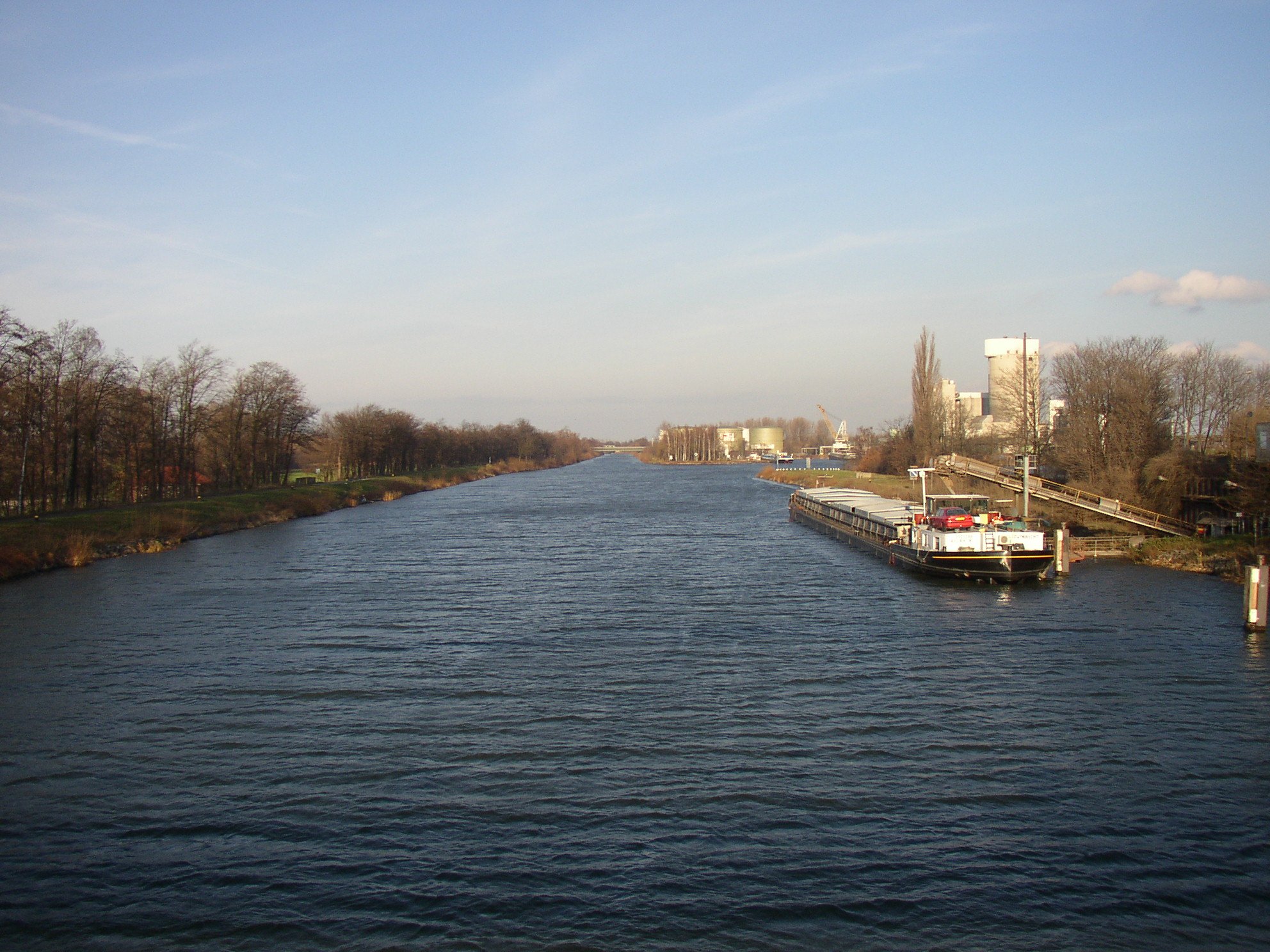 Stichkanal Salzgitter am Hafen Beddingen, Blick nach Norden.